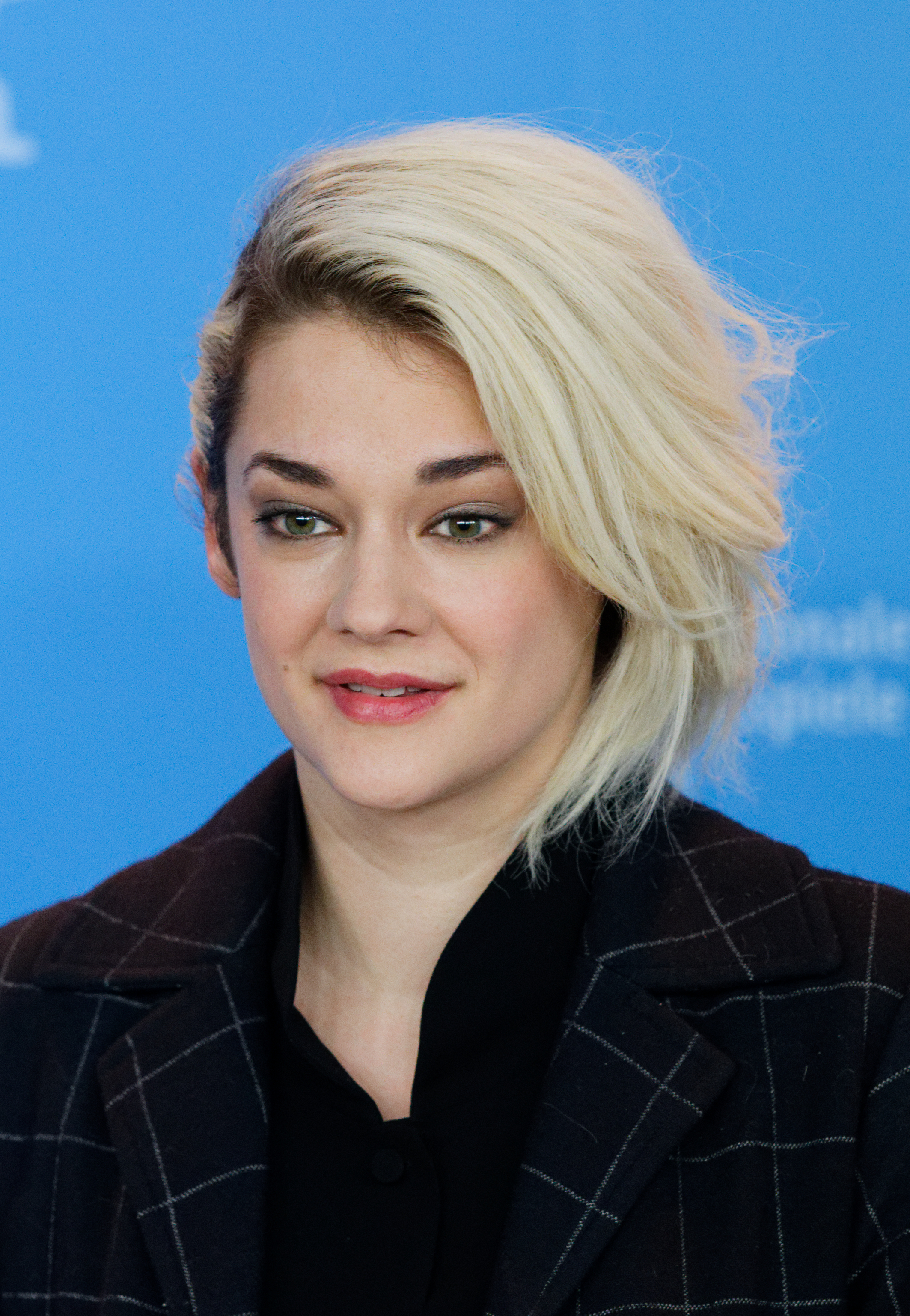 Victoire Du Bois beim Photo Call zu Call Me By Your Name bei der Berlinale 2017